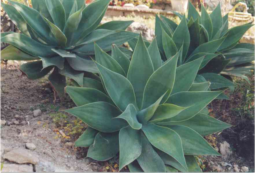 Immagine di una agave a foglie grandi scattata nella primavera del 2004 nei giardini di Villa Hanbury a Ventimiglia